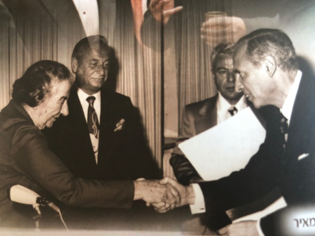 דניאל רקנאטי עם גולדה מאיר